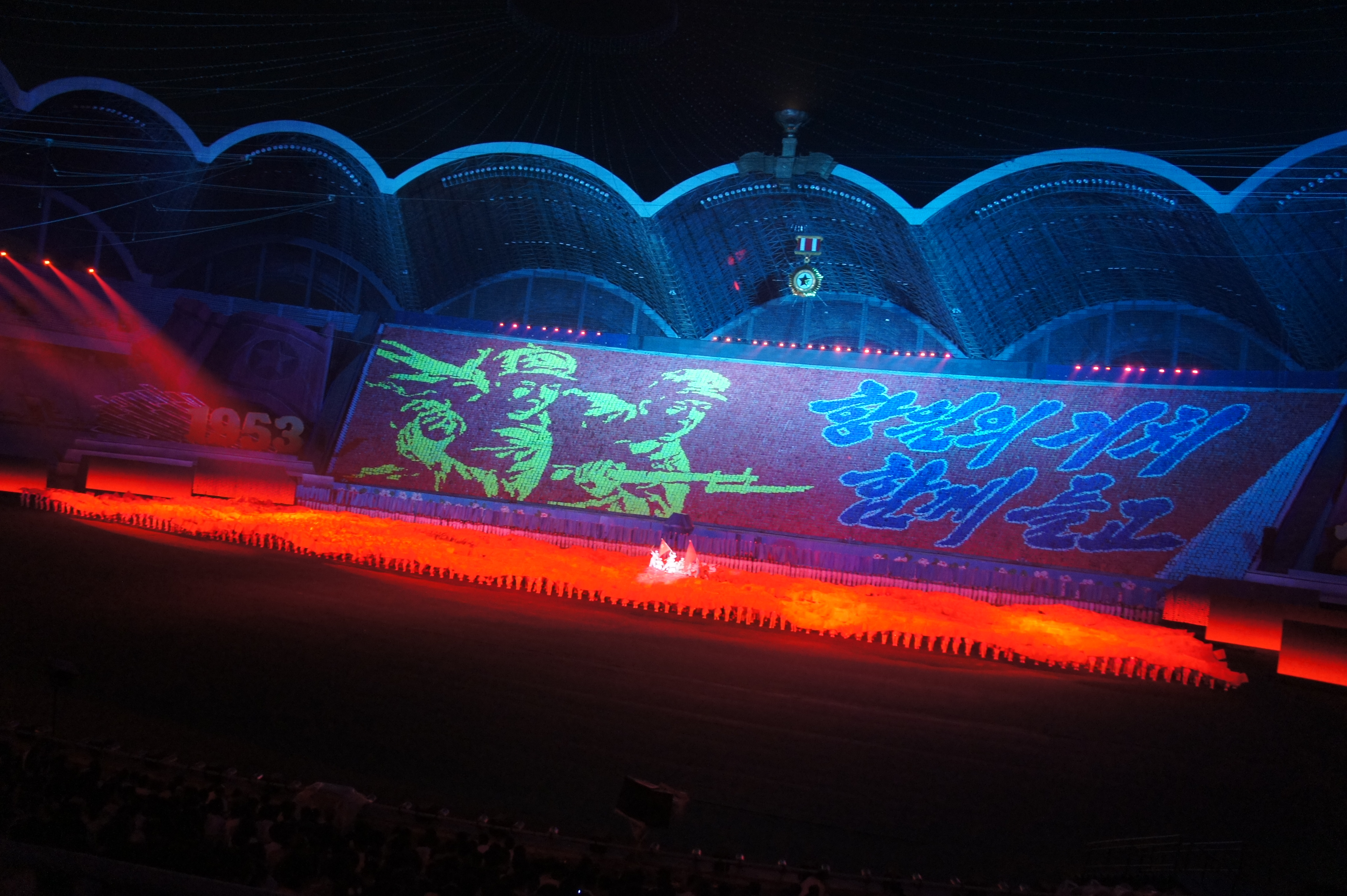 La Gimnasia de las Grandes Masas y Actuación Artística Arirang o simplemente Festival Arirang (chosŏn'gŭl: 아리랑 축제, hancha: 아리랑 祝祭, romanización revisada: Arirang Chukje, McCune-Reischauer: Arirang Ch'ukche)?, es un festival que se lleva a cabo en el Estadio Reungrado Primero de Mayo en Pionyang, Corea del Norte.